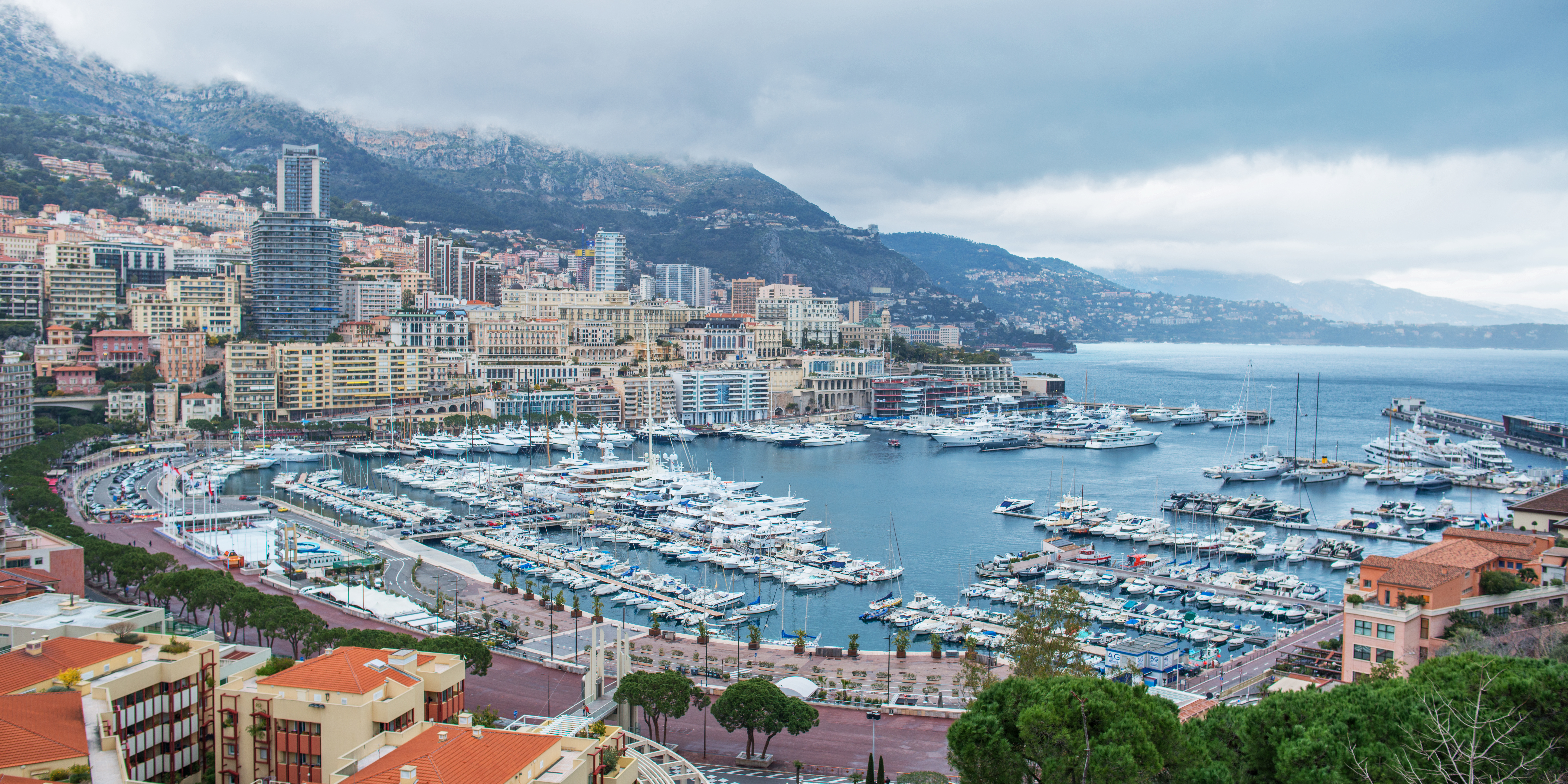 Monte Carlo Monaco February 2013